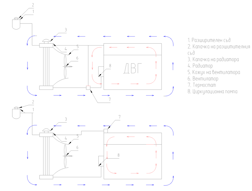 Схеми на двуклапанен и едноклапанен термостат